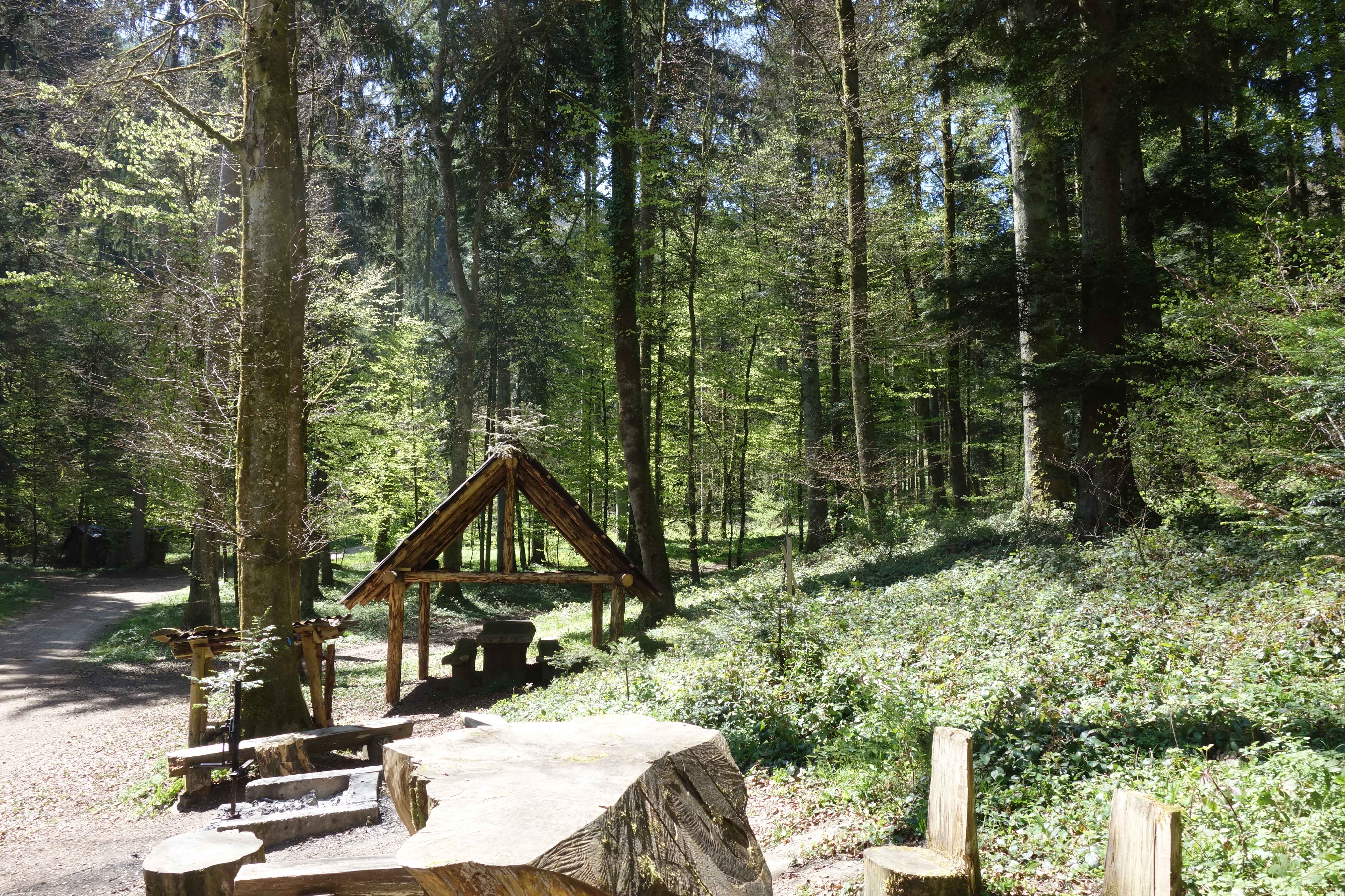 Der Wald bietet vielfältige Funktionen.